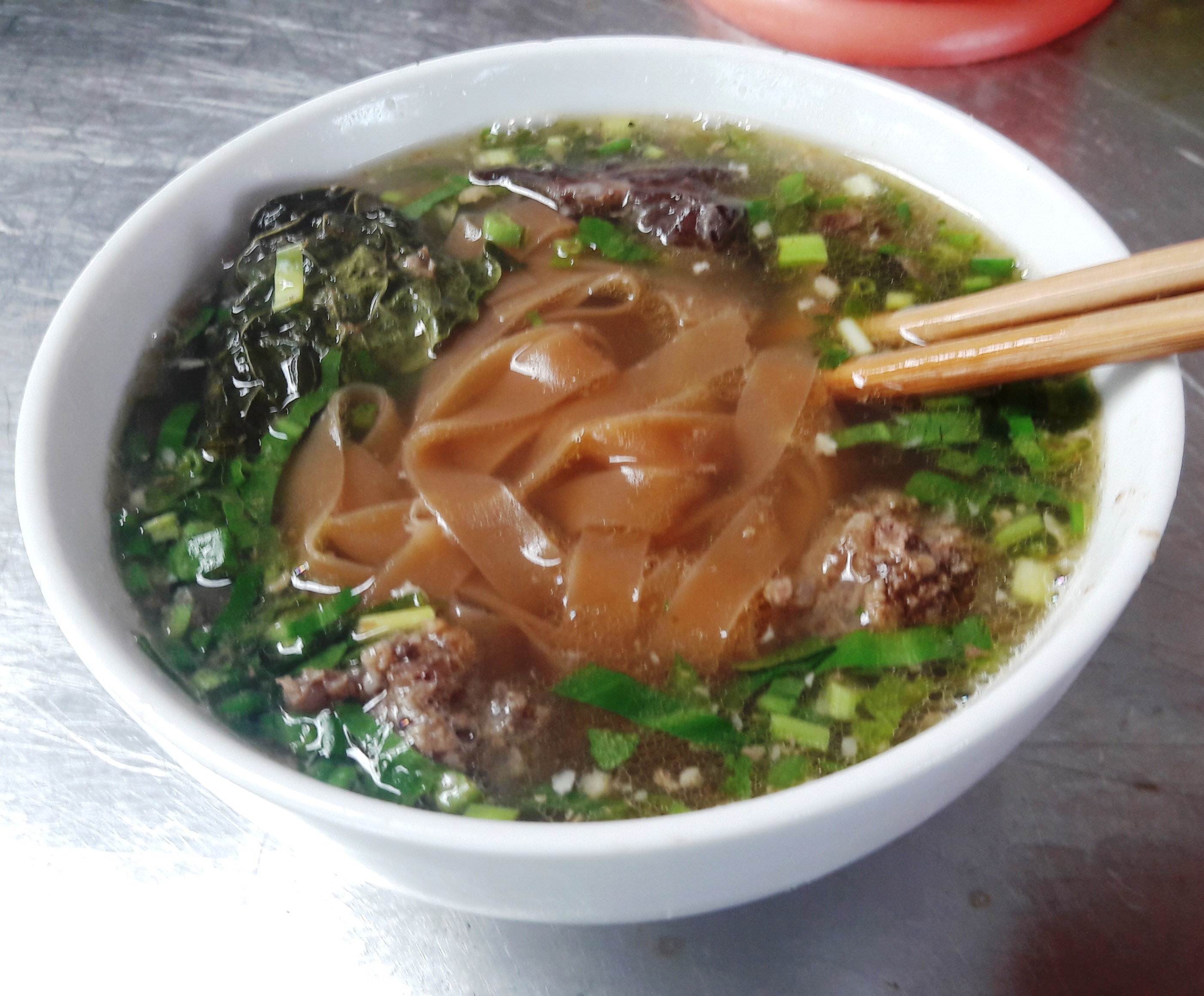 Cuisine of Vietnam